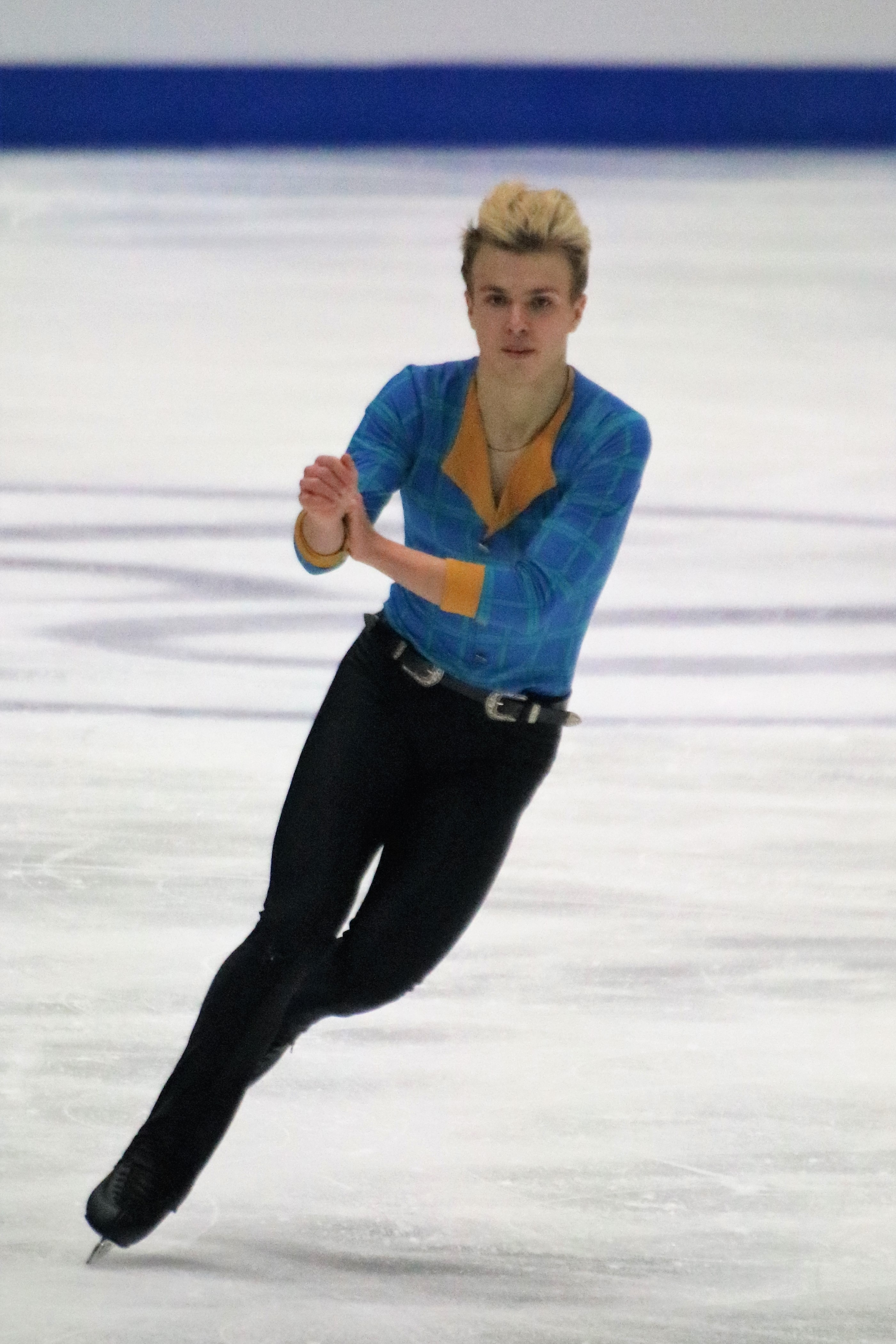 Матеаш Белоградкий (Чехия) на чемпионате Европы по фигурному катанию 2020